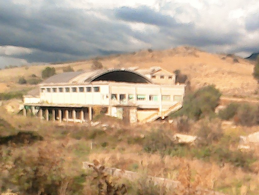 Ex impianto industriale per lo stoccaggio agrumario della stazione Ferrovia Motta Sant'Anastasia-Regalbuto di Mandarano-Centuripe.